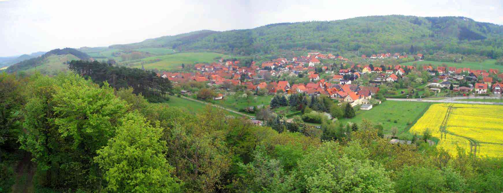 Blick auf Benzingerode